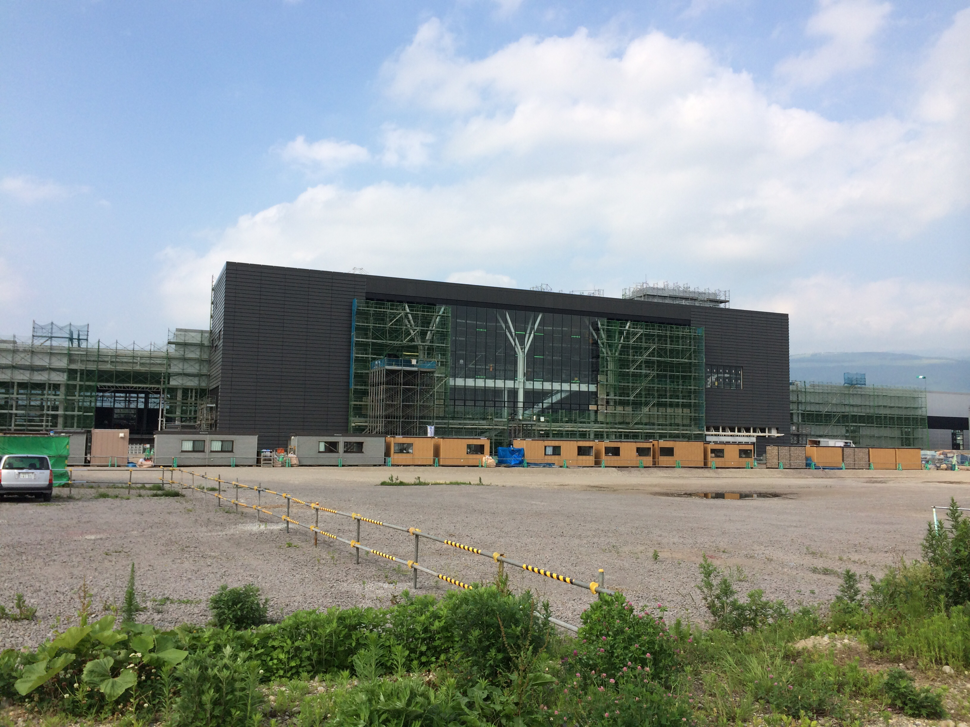 新函館北斗駅の建設（2014年7月現在）